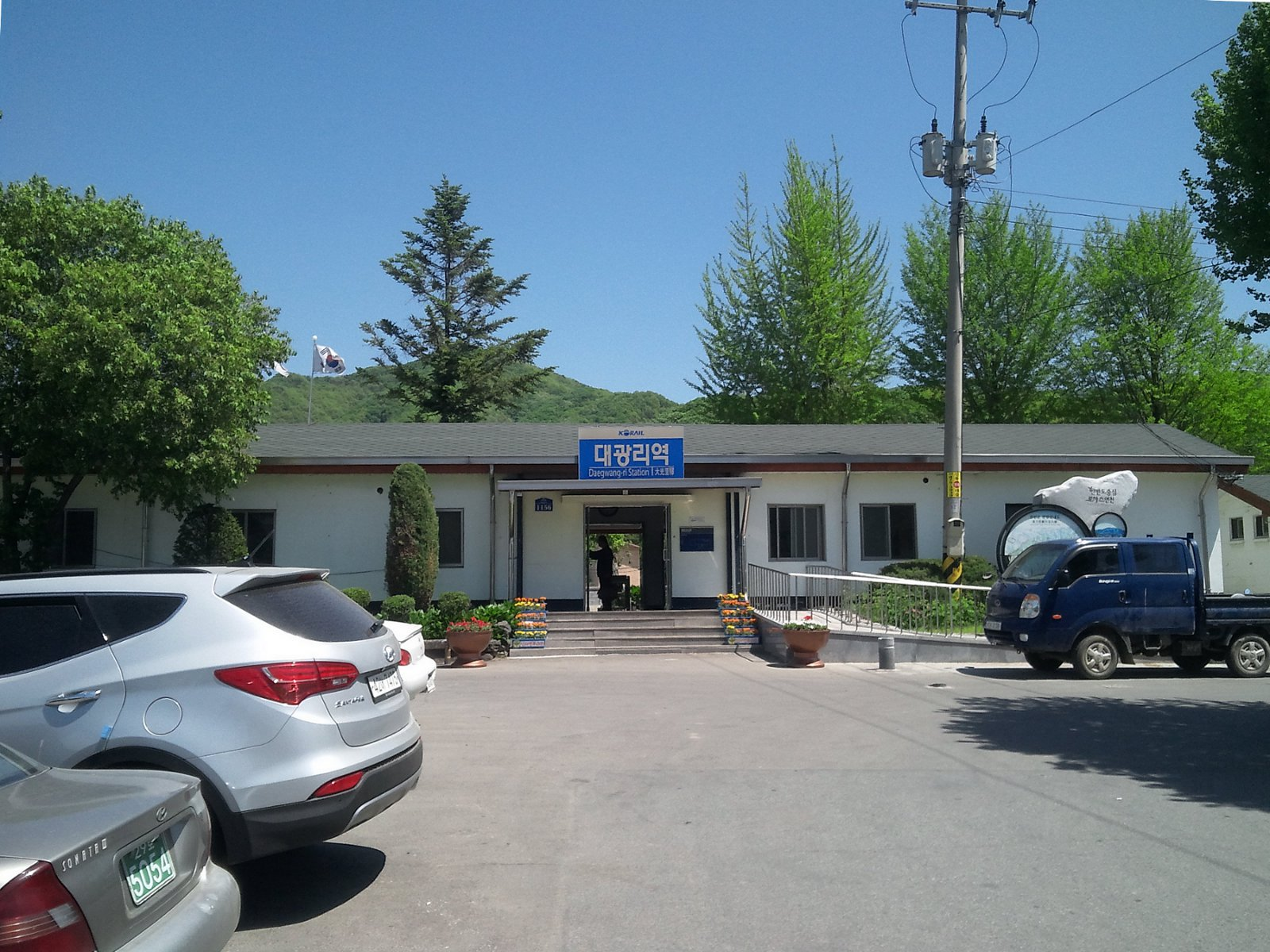 대광리역 역사 전경